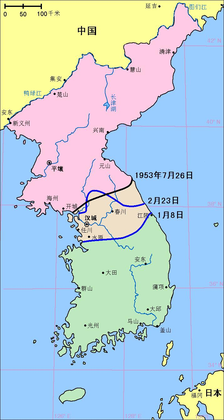 朝鲜战争第四阶段联合国军进攻和相持阶段形势地图